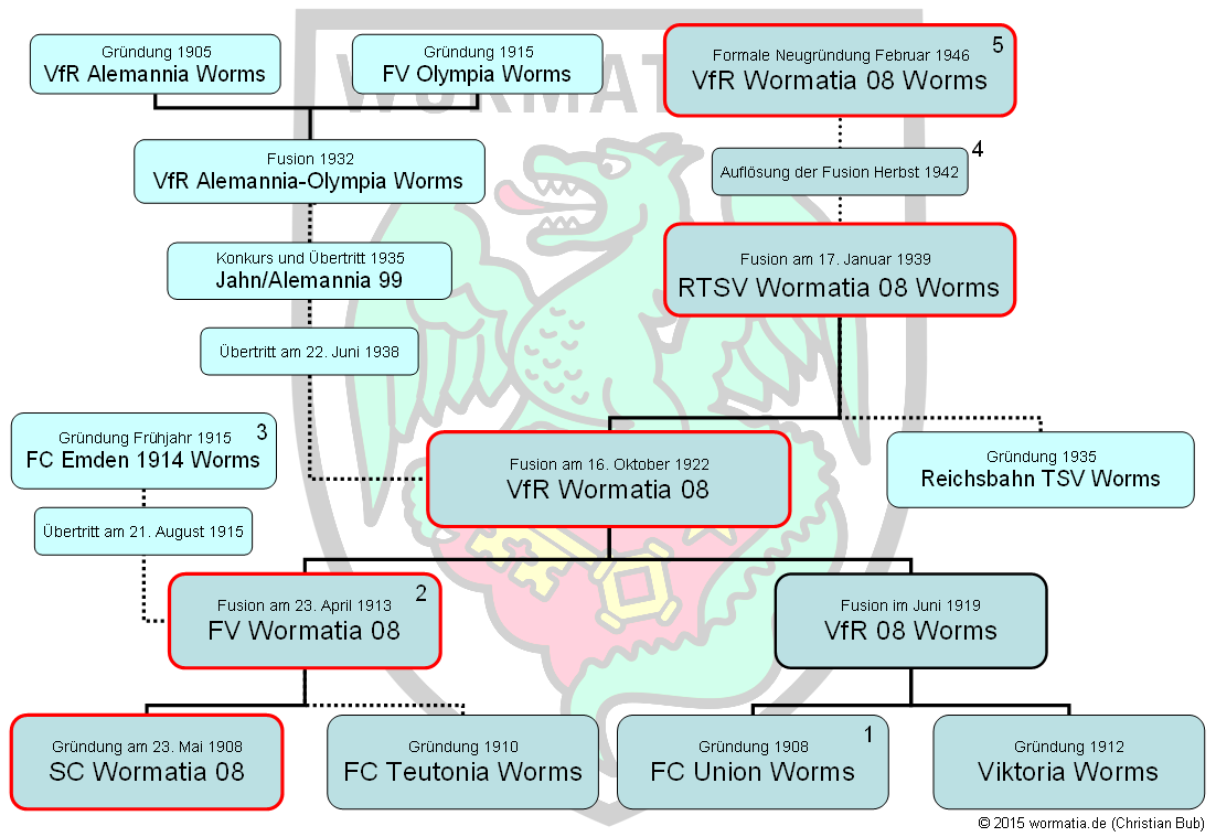 Die Gründungsgeschichte des VfR Wormatia 08 Worms als Schaubild mit allen bekannten Fusionen und Eingliederungen (Stand 2015)